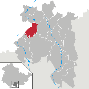 Siegmundsburg in Thüringen, Landkreis Sonneberg